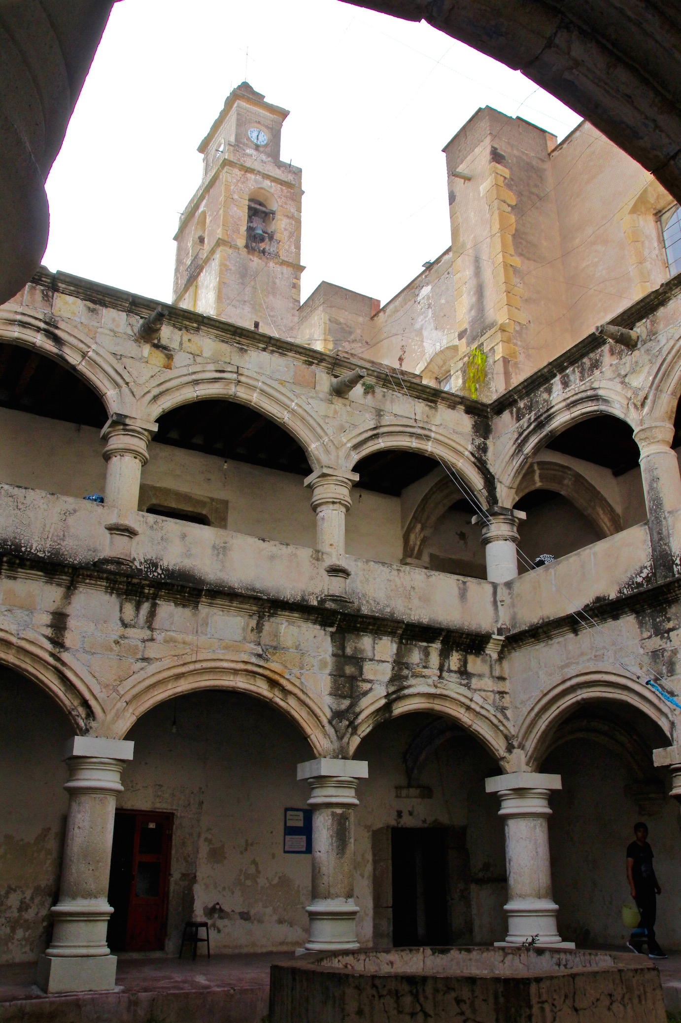 Vista del claustro del Ex Convento de Todos Santos en Zempoala S.XVI